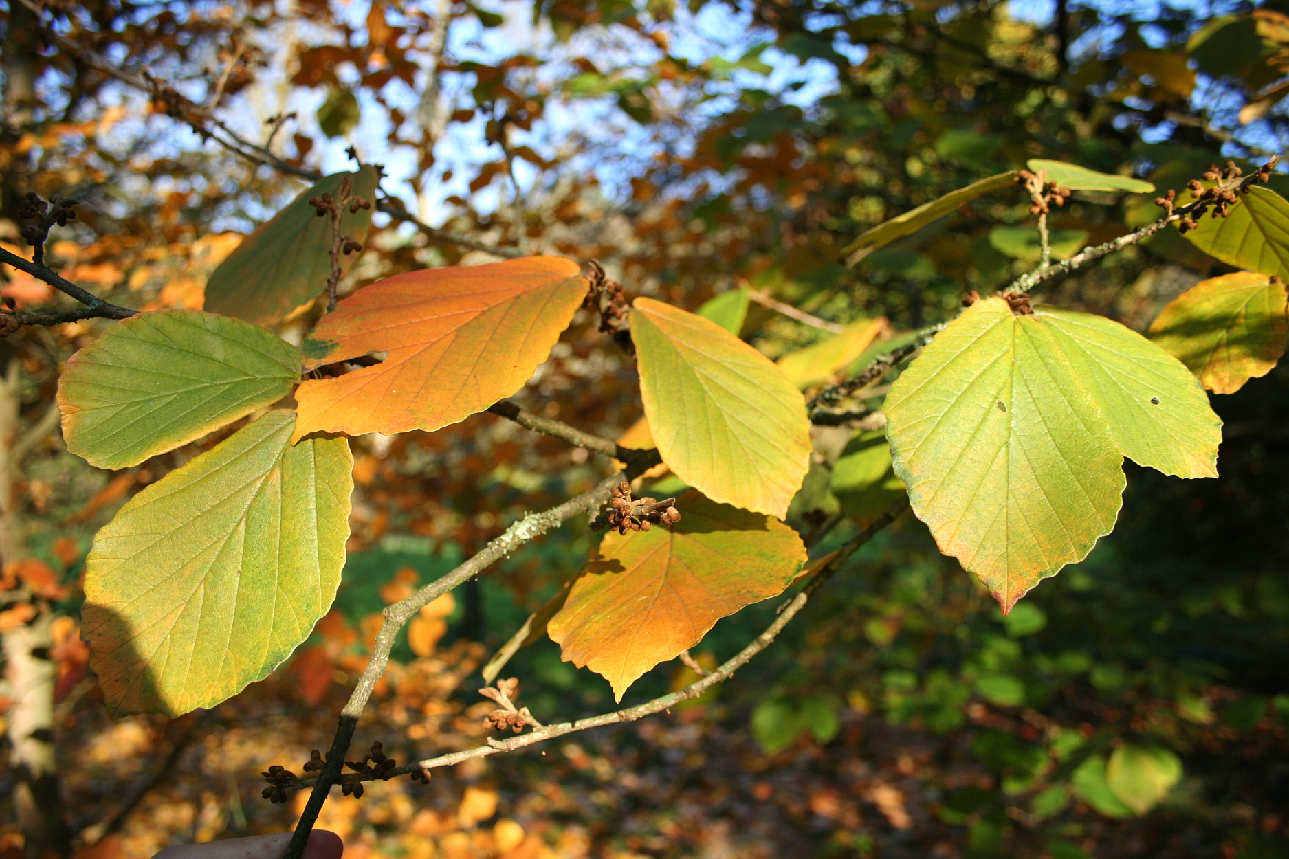 Feuilles de l' Hamamelis molis